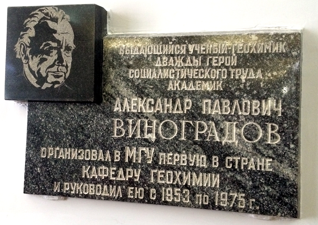 Мемориальная доска в честь Александра Павловична Виноградова. Геологический факультет МГУ, Кафедра Геохимии.